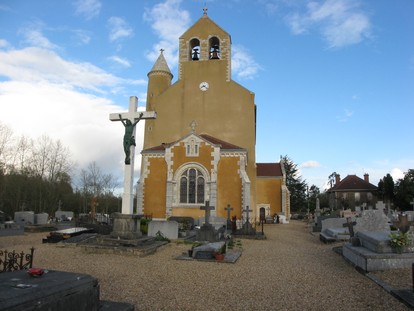 Eglise de Biaudos (Landes (département)) (Pyrénées).